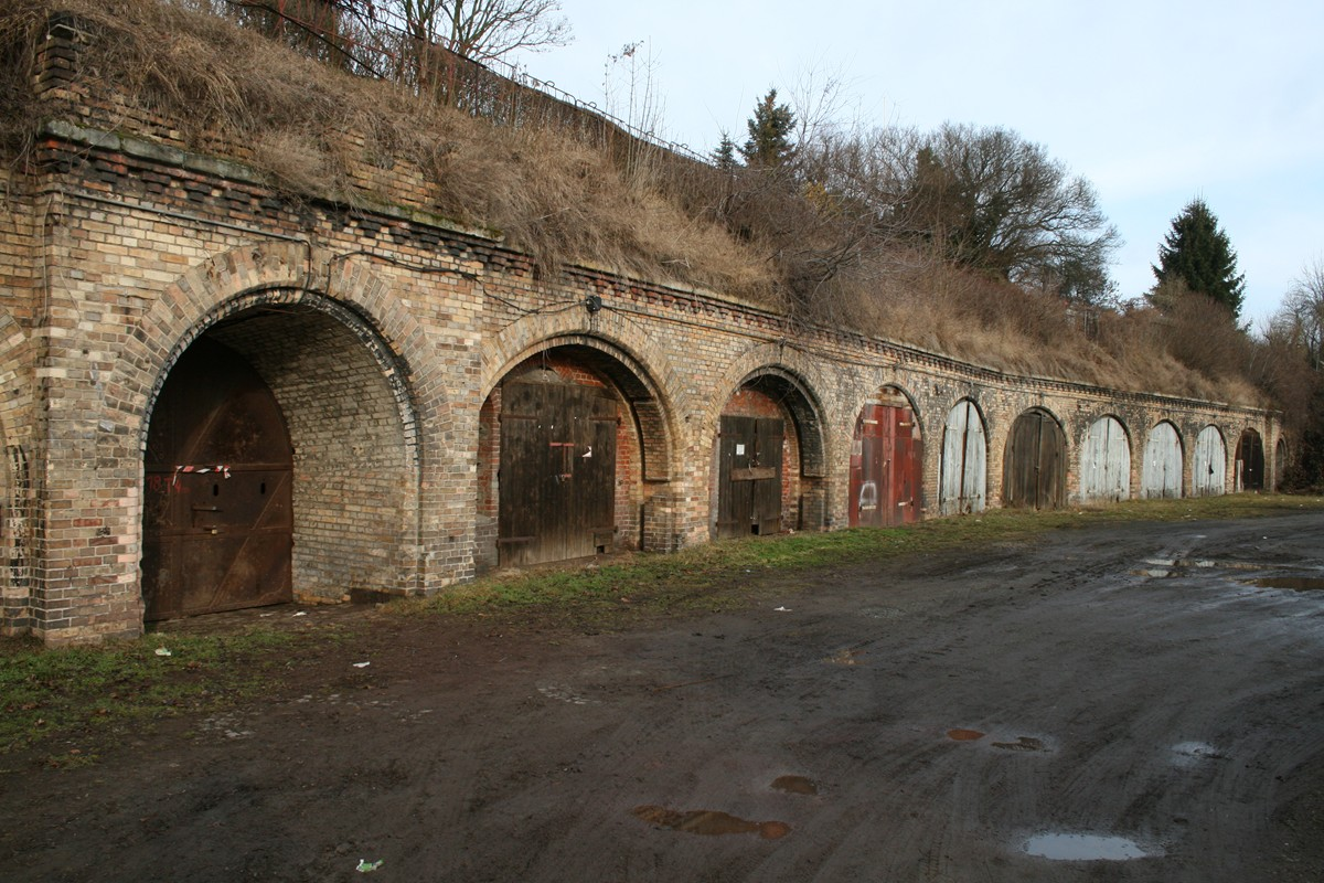 Magdeburg Kavalier 5